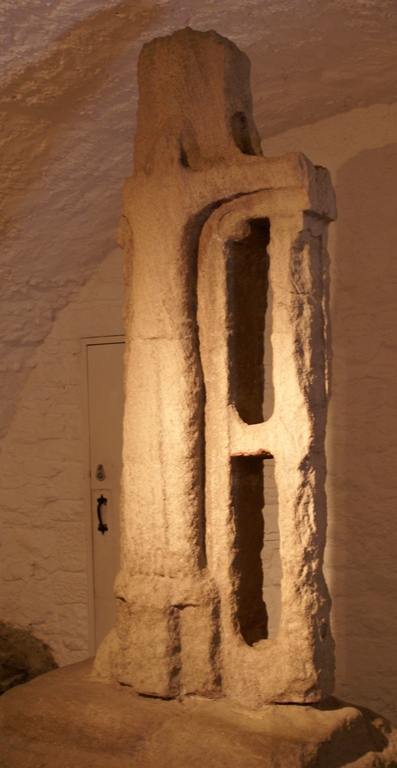 Rock of Cashel, county Tipperary, Ireland - St. Patrick's Cross